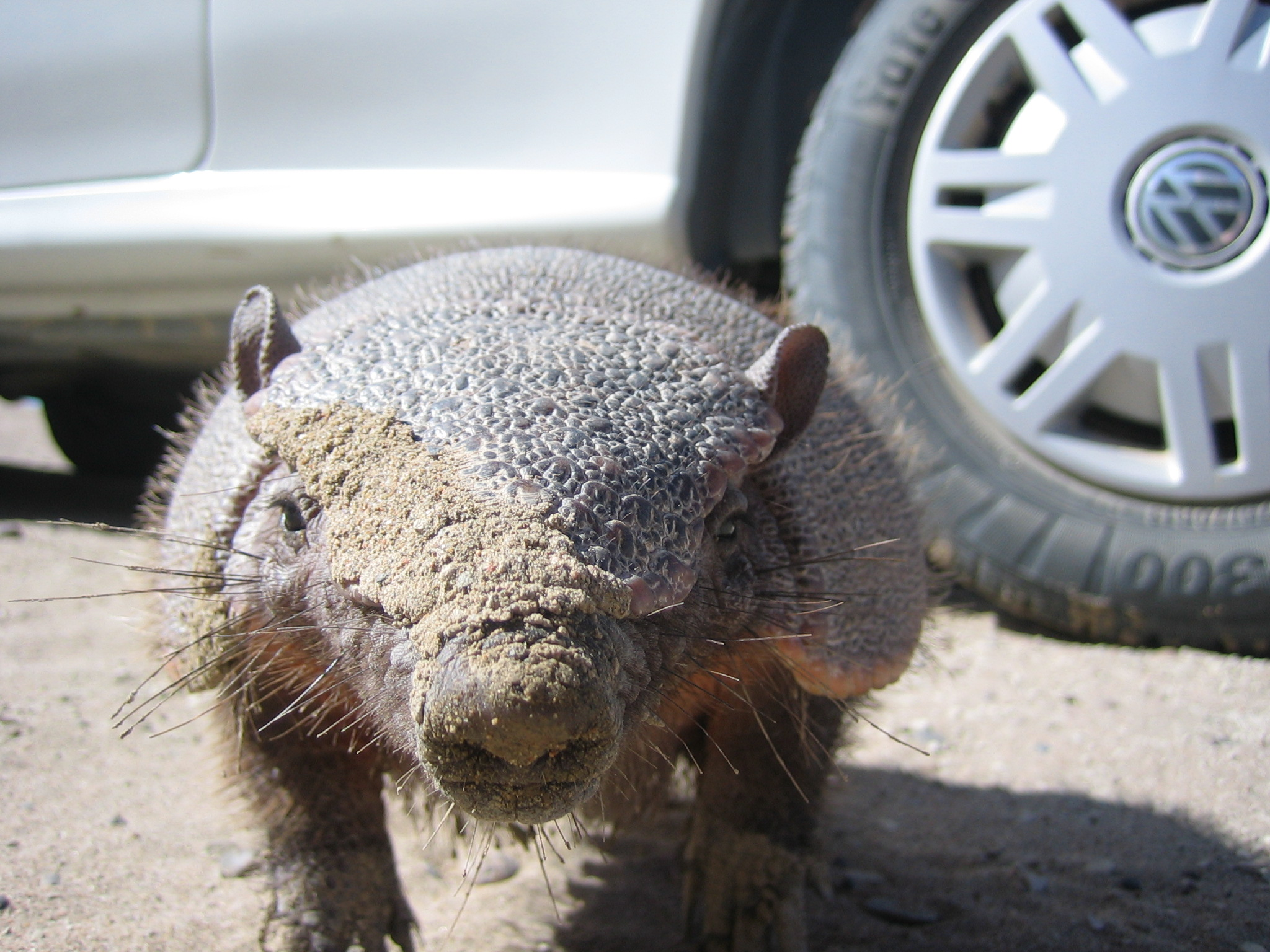 Chaetophractus villosus. Von mir selbst aufgenommen und unter Public Domain gestellt.